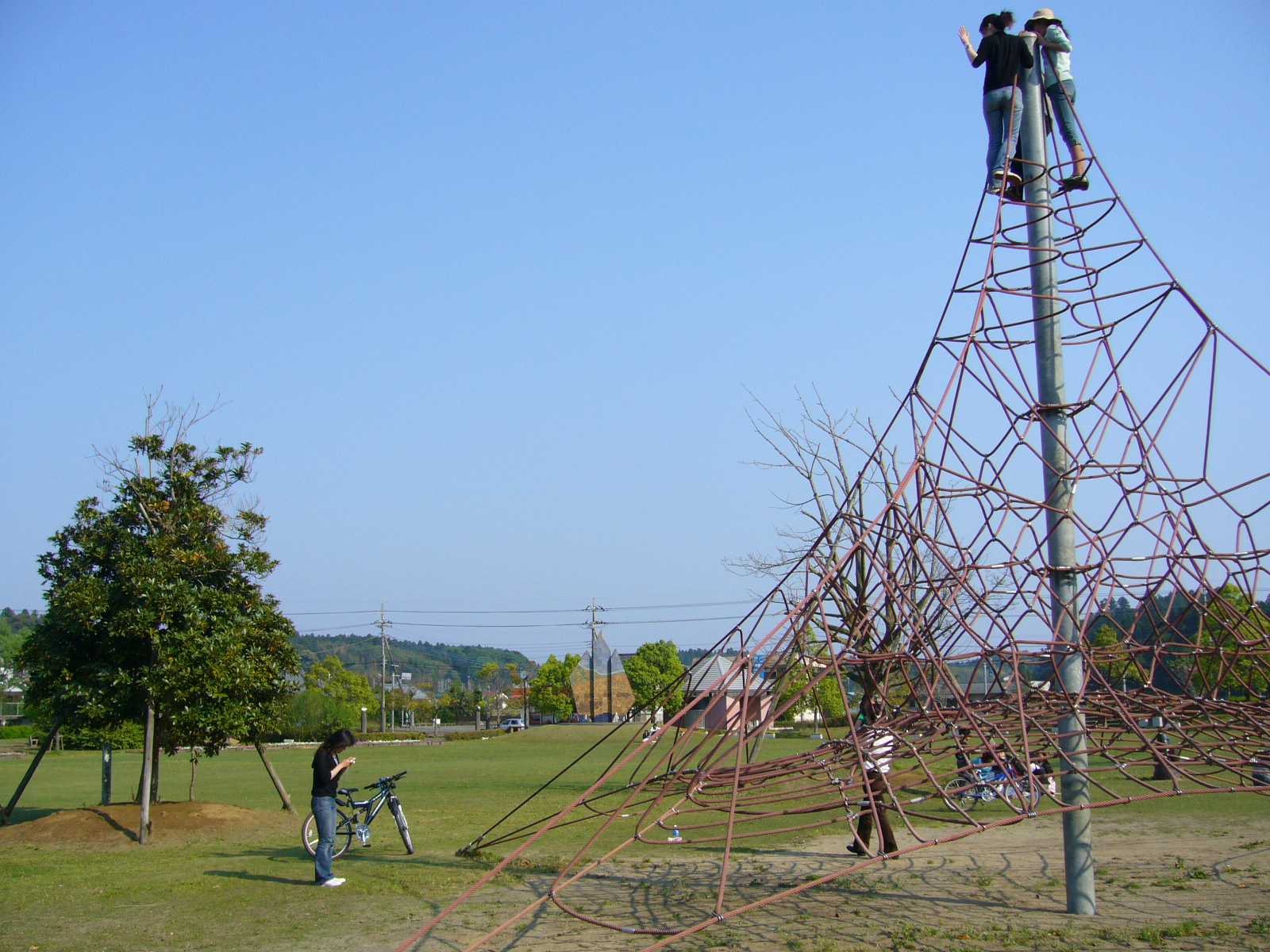 kurimoto-hureainosato-park2,katori-city,japan